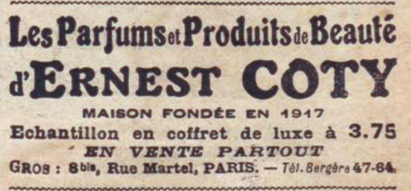 Publicité pour une contrefaçon dans Le Rire